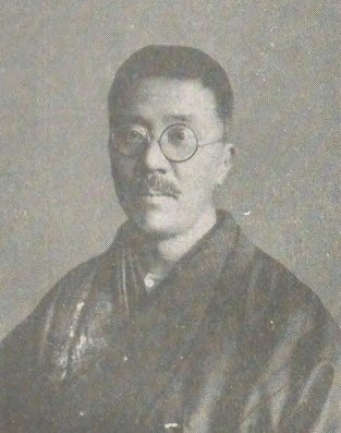 岡本実太郎